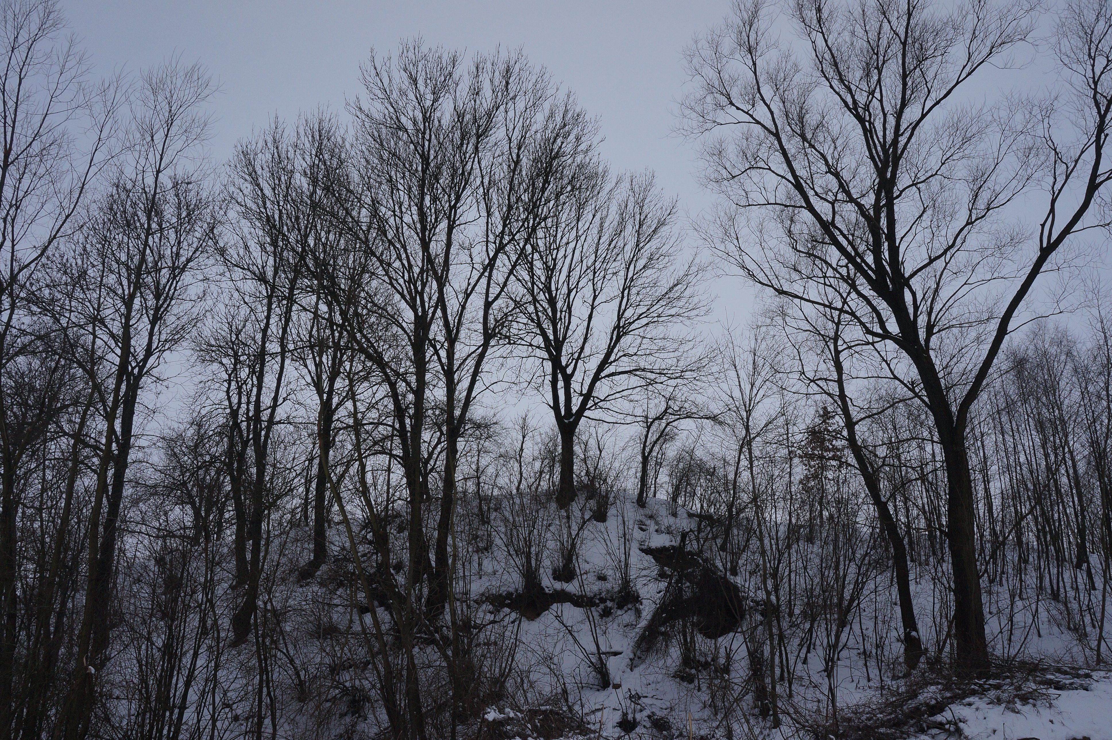 Городище давньоруське літописного міста Вишні (Судова Вишня I), Судова Вишня, ур. Замчисько, Вали.